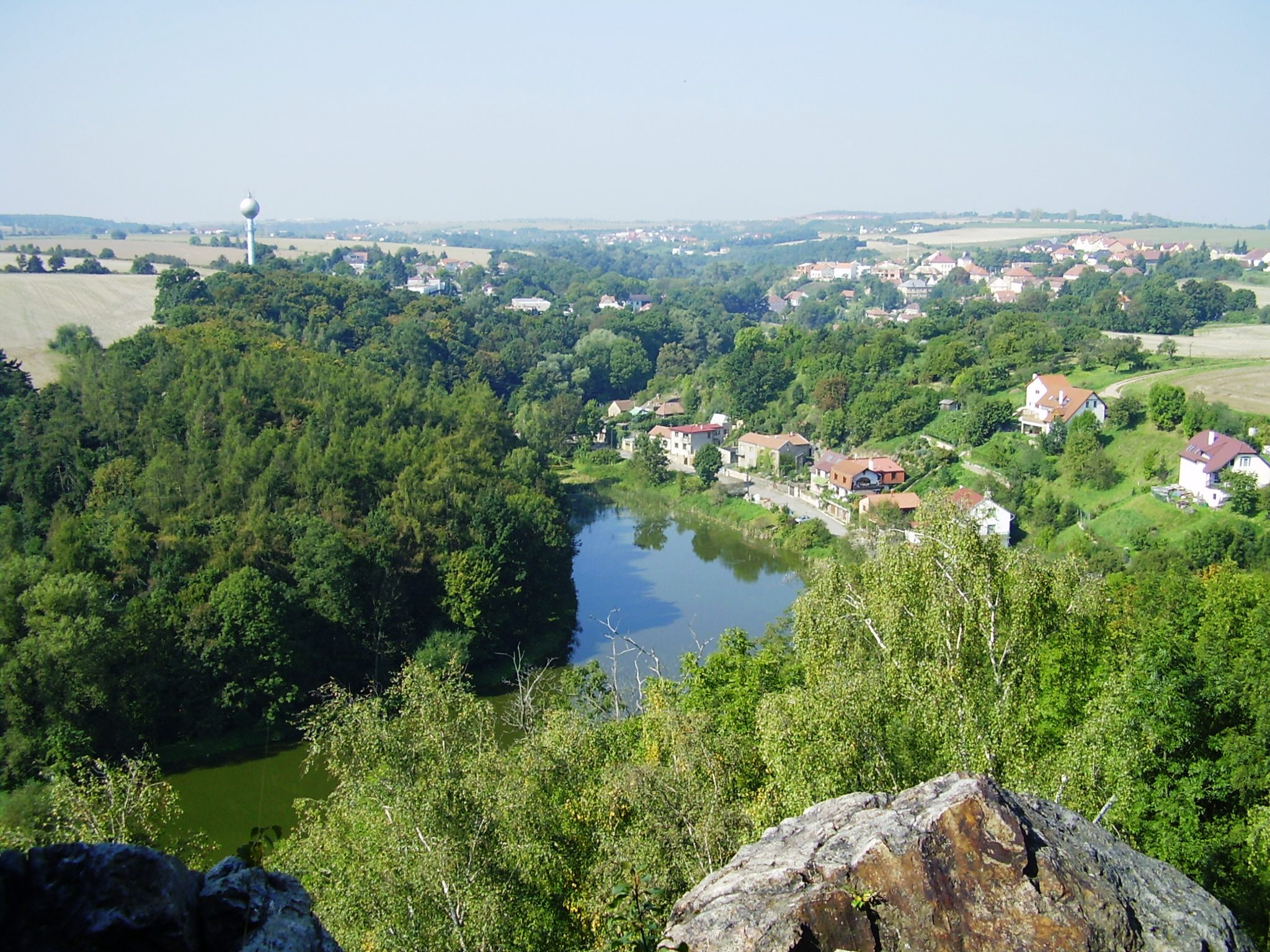 Unětice,pohled z Tichého údolí.